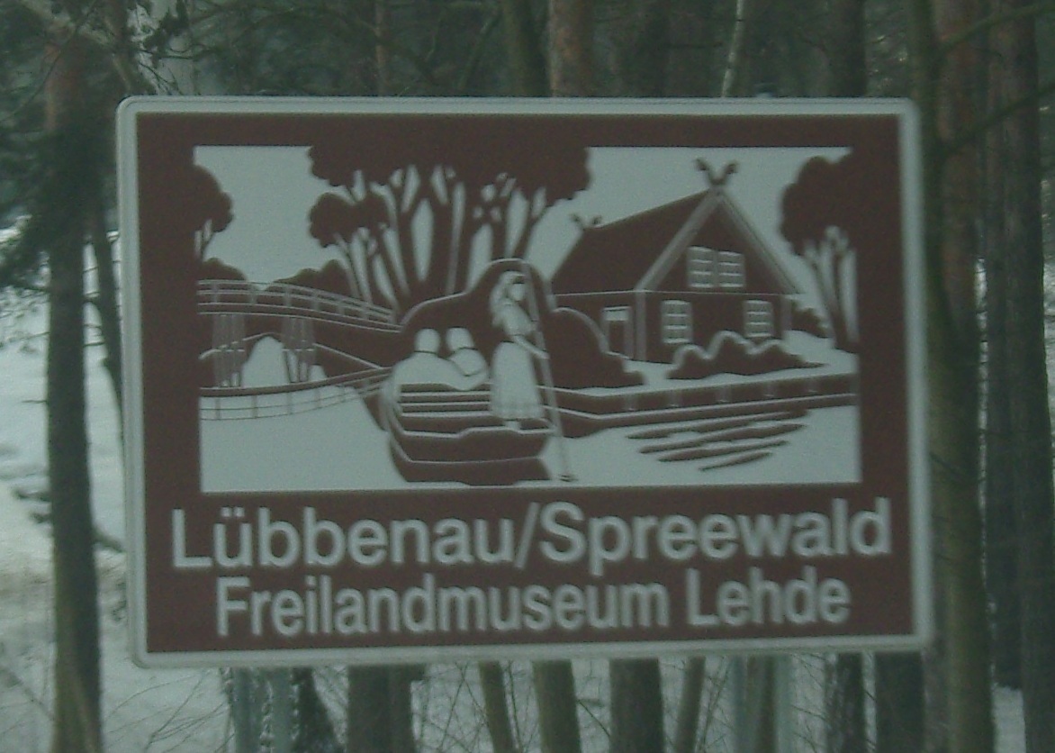 Unterrichtungstafel an der A 13 und A 15 - Hinweis auf das Spreewaldmuseum in Lehde